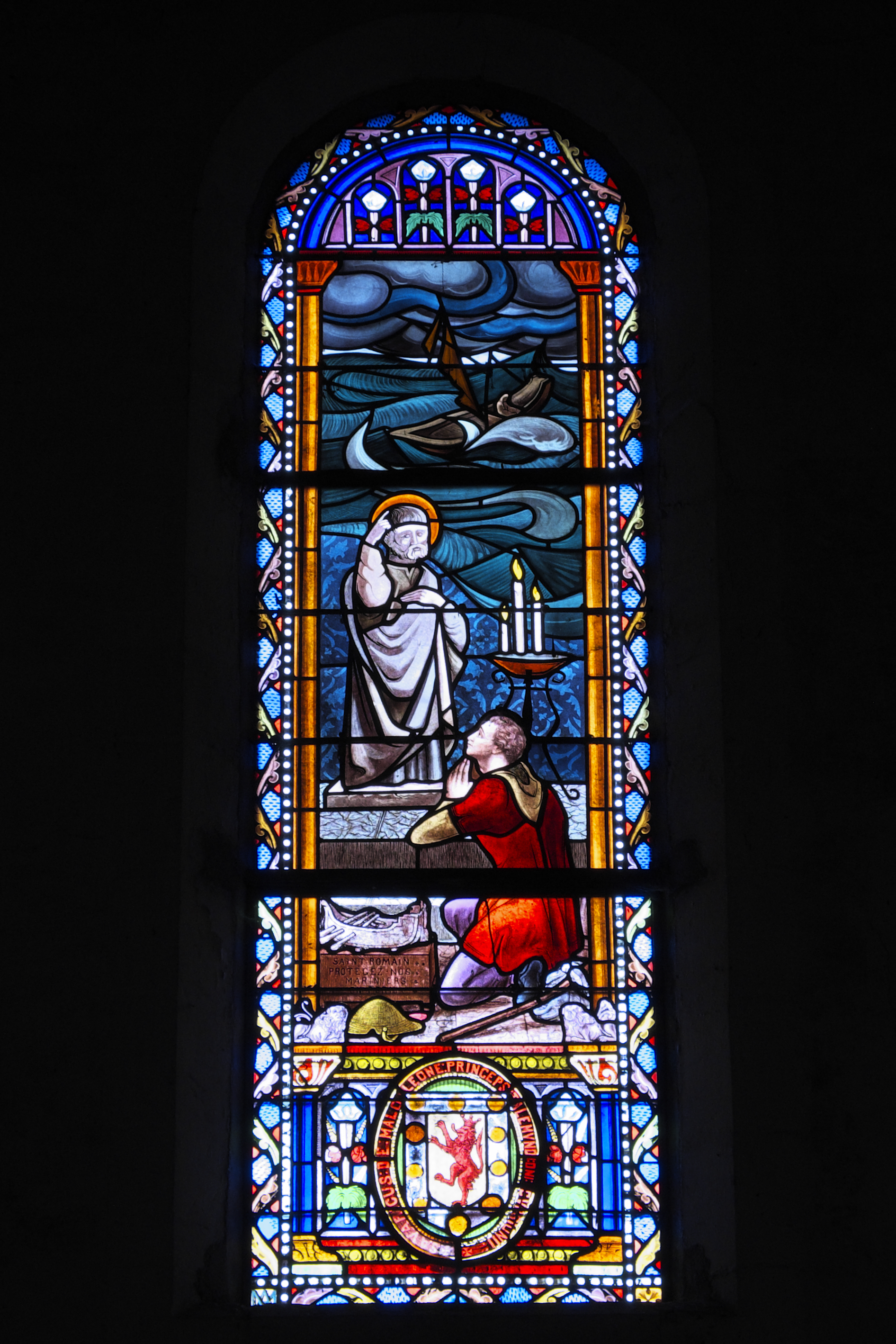 Kirche Saint-Romain in Curzon im Département Vendée (Pays de la Loire/Frankreich), Bleiglasfenster; Darstellung: Heiliger Romanus